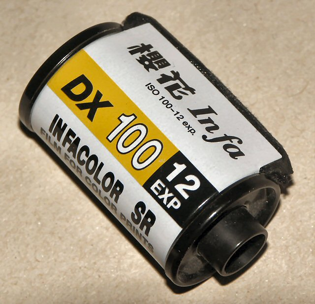 Infacolor DX100, ein Kleinbild-Farbnegativfilm mit 12 Bildern. Kamera: Minolta Dimage 7Hi